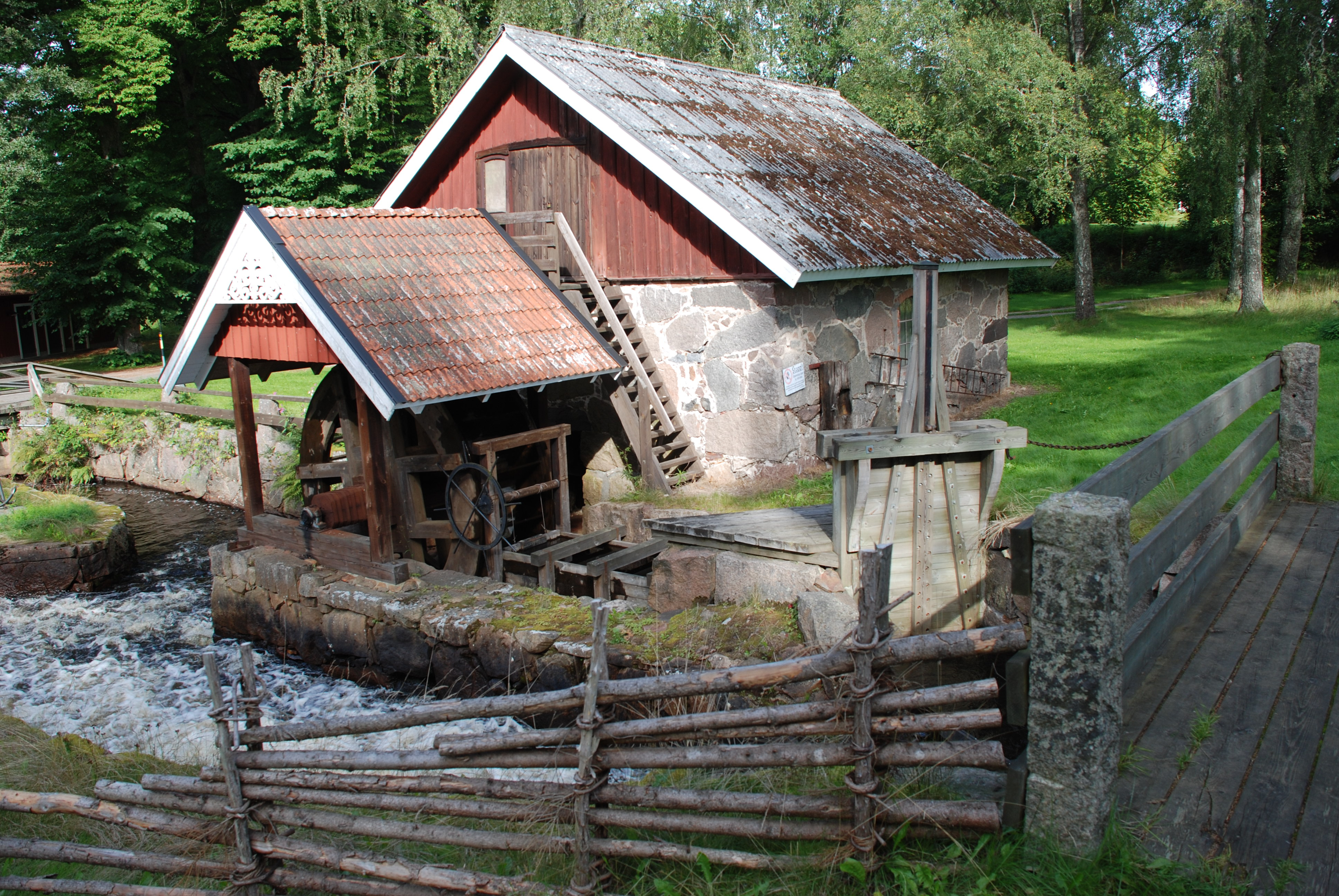 Vattehjulet i Åryd är en rekonstruktion från 1997.